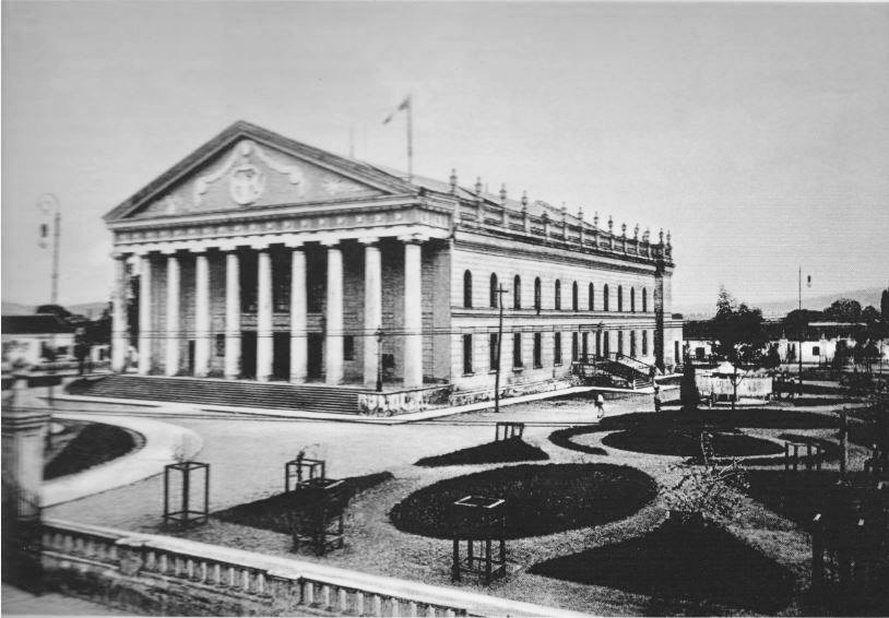 Teatro Carrera en la década de 1880.